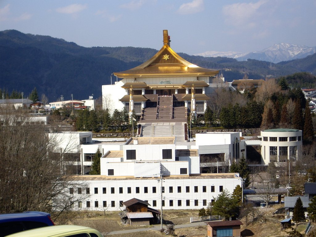 崇教真光世界総本山（日本岐阜県高山市）, Sukyo Mahikari Headquarter (Takayama City, Gifu, Japan)